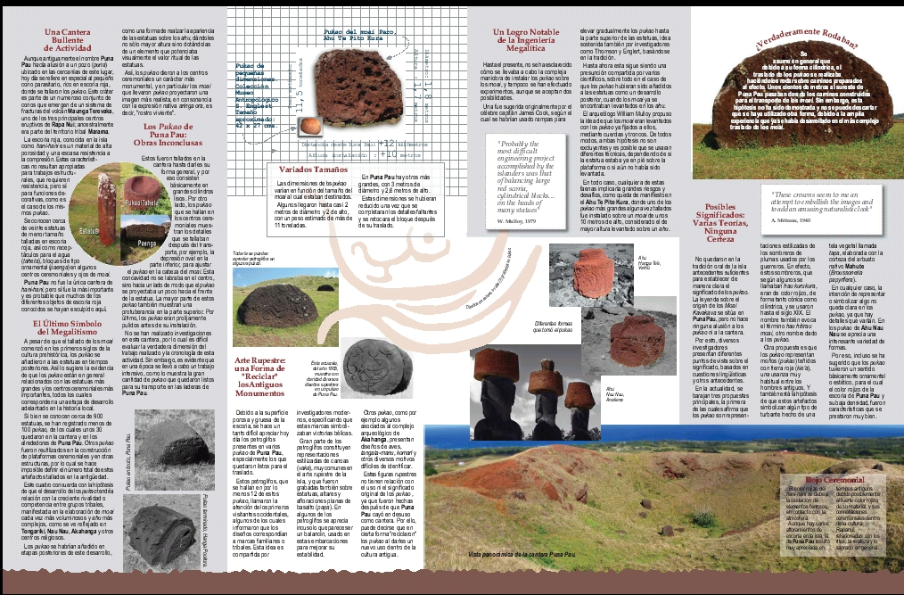 Interior folleto Puna Pau